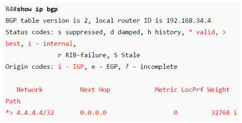 Монгол: Picture1-17